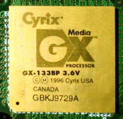 Media GX Processor